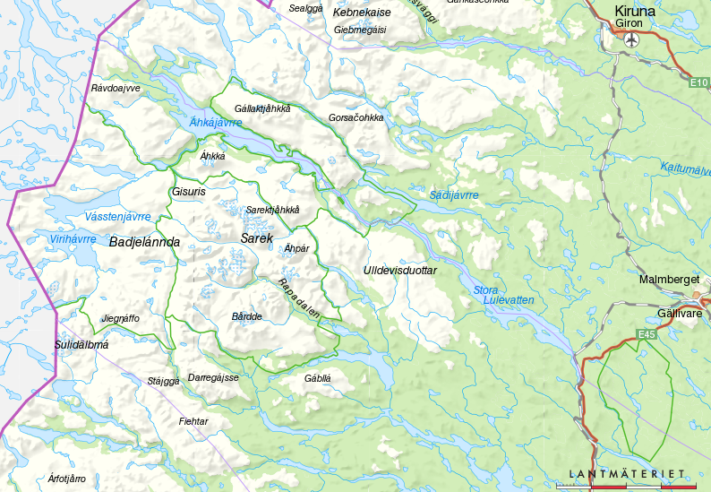 Översiktskarta över de fyra nationalparkerna i Laponia – från väster Padjelanta, Sarek, Stora Sjöfallet och Muddus. De avgränsas med gröna gränser.